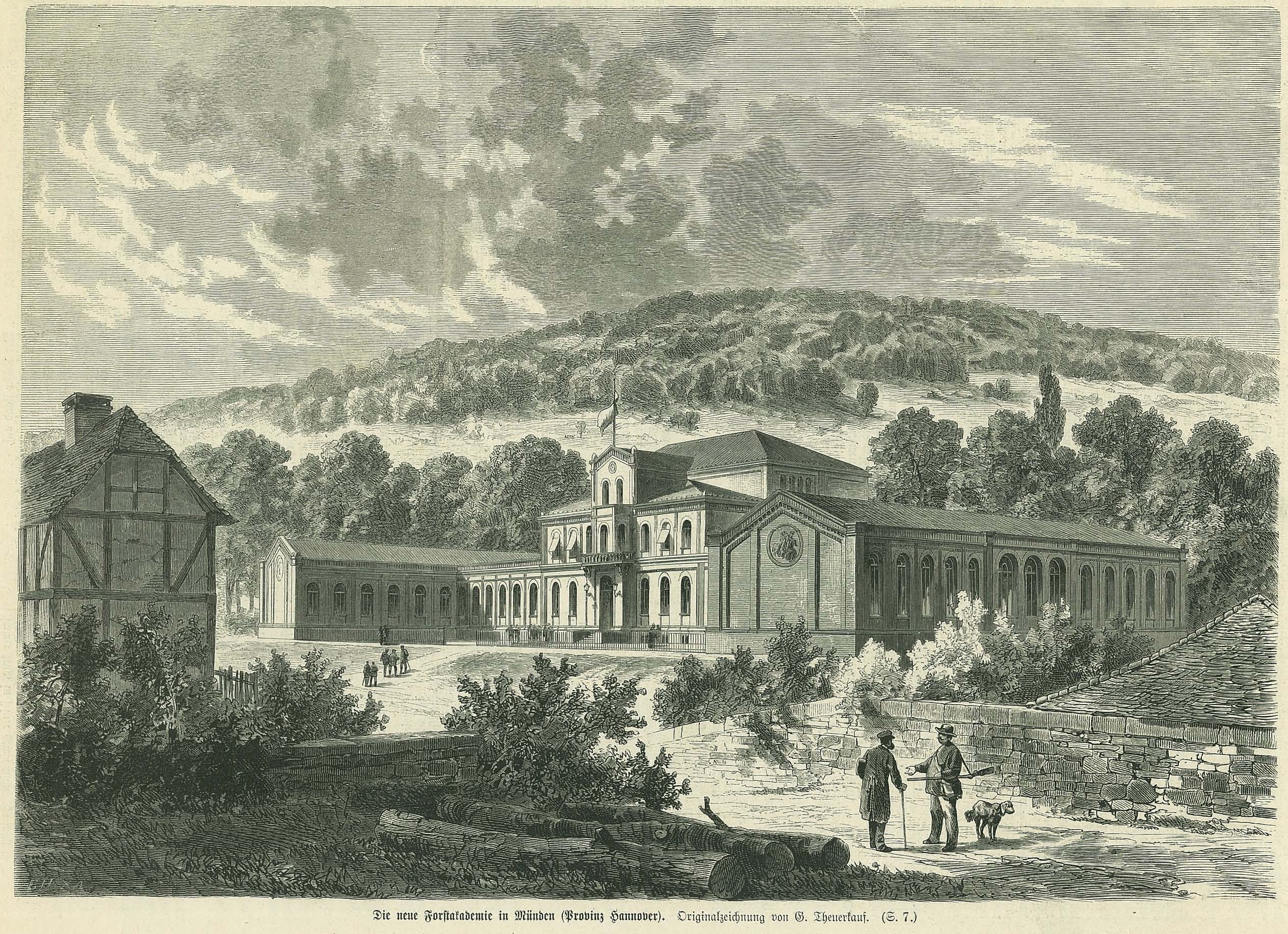 Ansicht der Königlich Preußischen Forstakademie Hannoversch Münden. Holzstich nach einer Zeichnung, 17,2 x 24,6 cm. Die Forstakademie Hann. Münden war eine 1868 gegründete Hochschule für Forstwissenschaften.